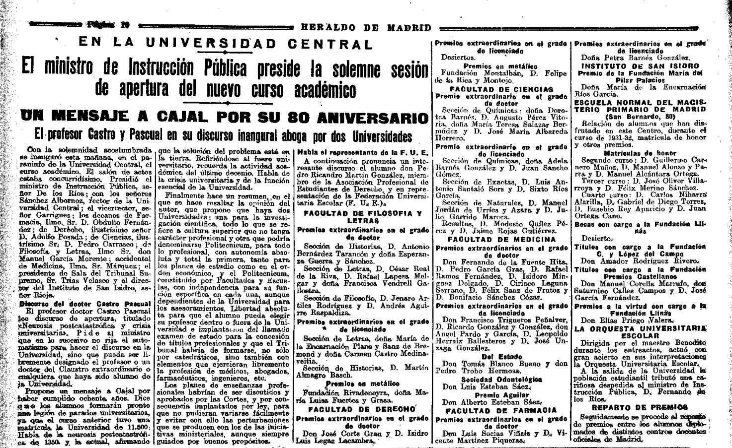 Publicación en el Heraldo de Madrid, de los premios extraordinarios de Doctorado y Licenciatura. Teresa Salazar Bermúdez, y Dorotea Barnés González fueron Premio Extraordinario Doctorado en Químicas en 1932 . El mismo año, Petra y Adela Barnés González fueron Premio Extraordinario de Licenciatura.